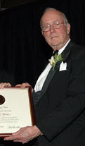 Charles Hard Townes, premio nobel de Física en 1964, recibiendo el premio Vannevar Bush en 2006.